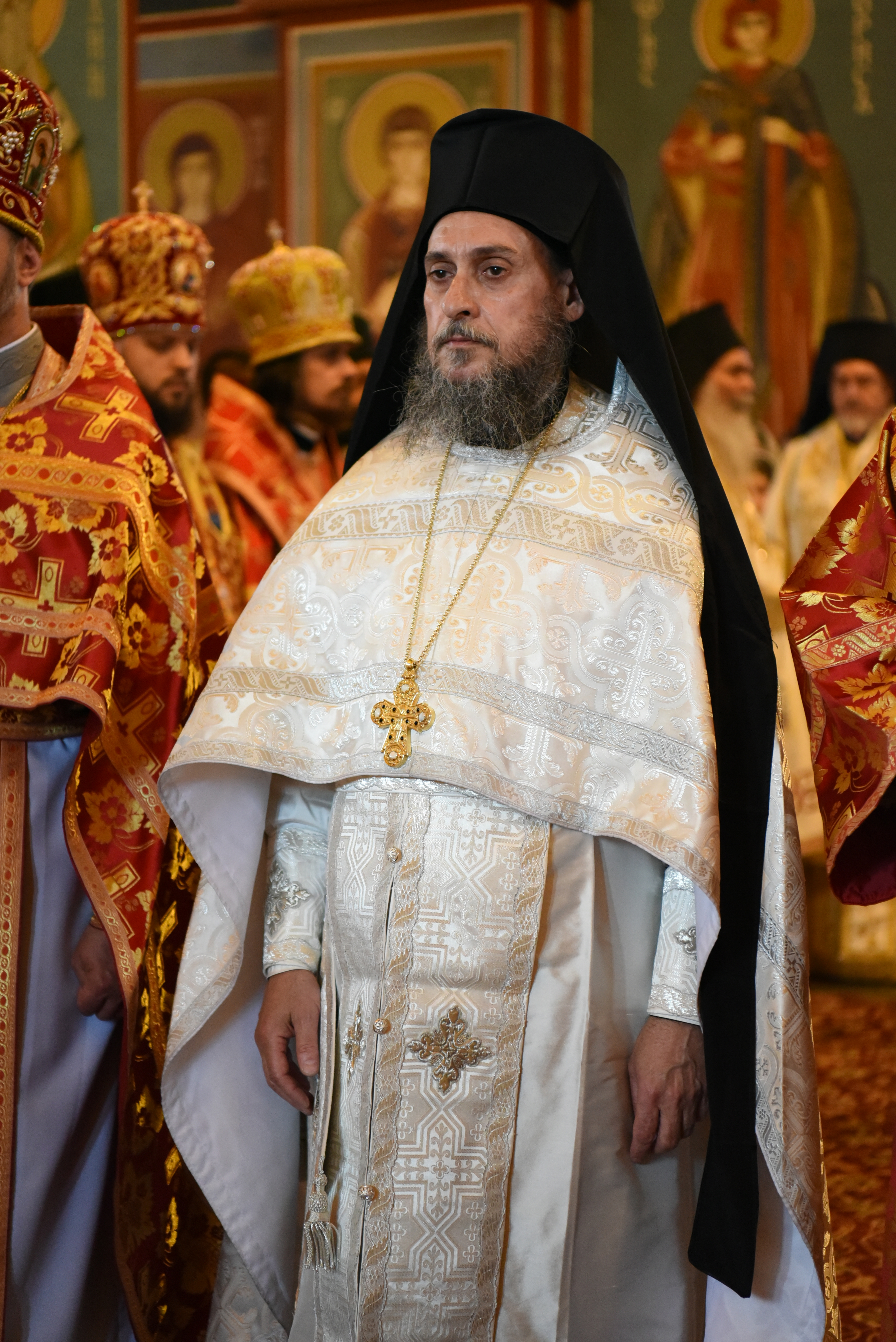 Михайлівський собор . Київ 2019